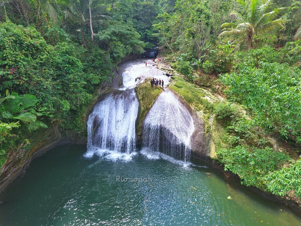 Air terjun kayuni di Kampung Kayuni Distrik Kramomongga Kabupaten Fakfak Papua Barat